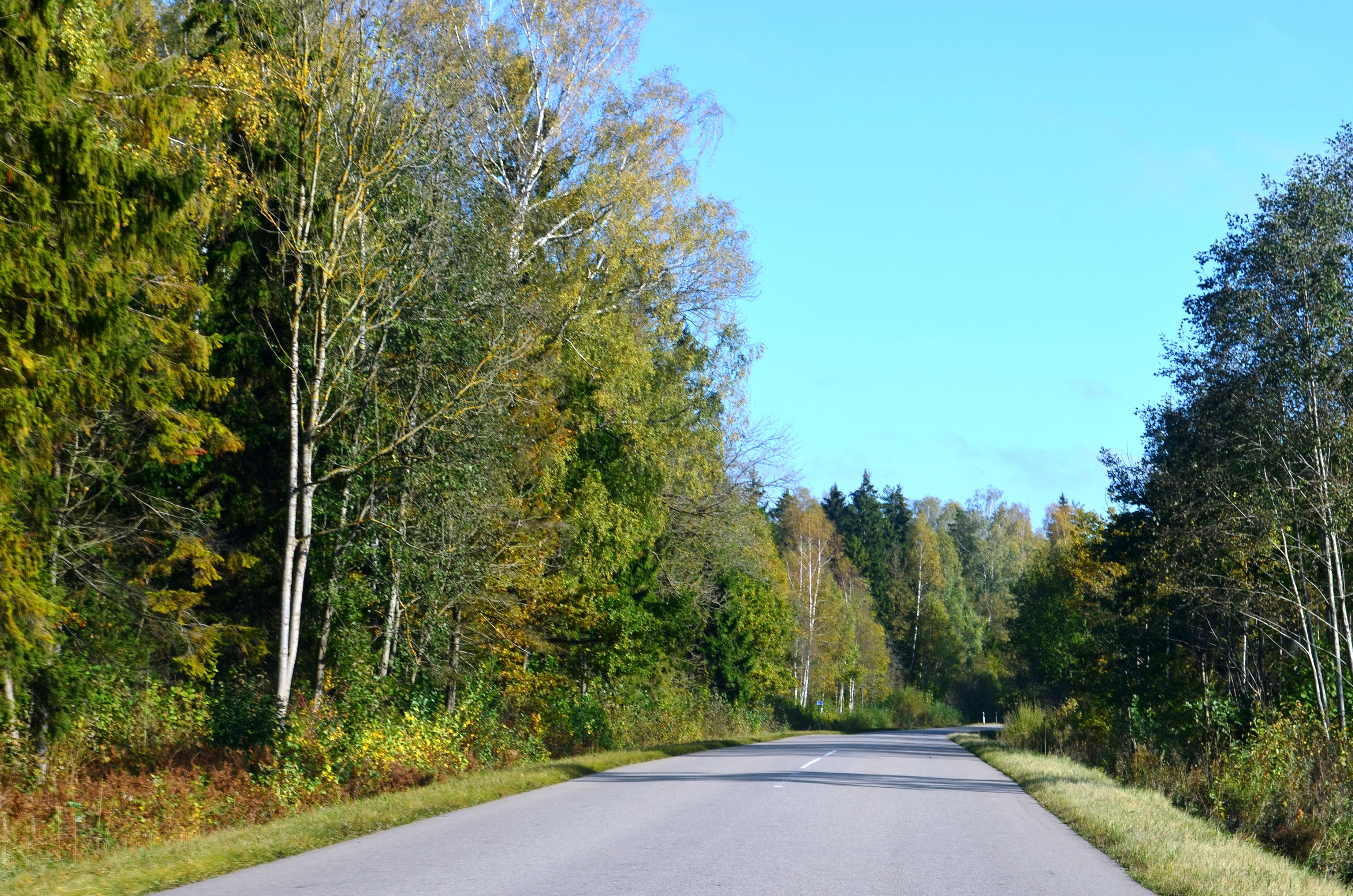 Gudžiūnų miškai į rytus nuo Skėmių, Radviliškio raj.